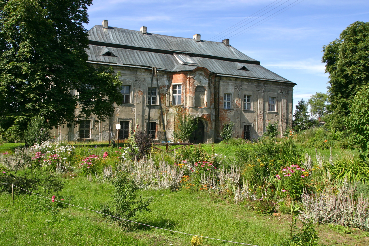 Pisarzowice (dodatkowa nazwa w j. niem. Schreibersdorf) – wieś w Polsce położona w województwie opolskim, w powiecie krapkowickim, w gminie Strzeleczki.